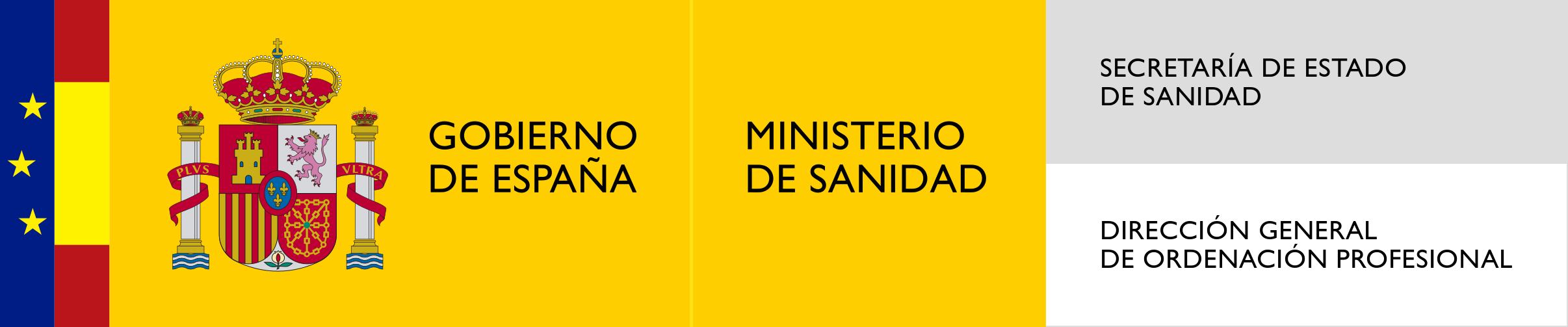 Logotipo de la Dirección General de Ordenación Profesional